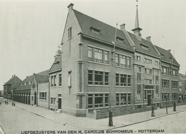 Gezicht op het klooster van de Liedezusters van den Heilige Carolus Borromeus aan de Mathenesserstraat. Links de Schaepmanstraat met de Sint-Nicolaaskerk.